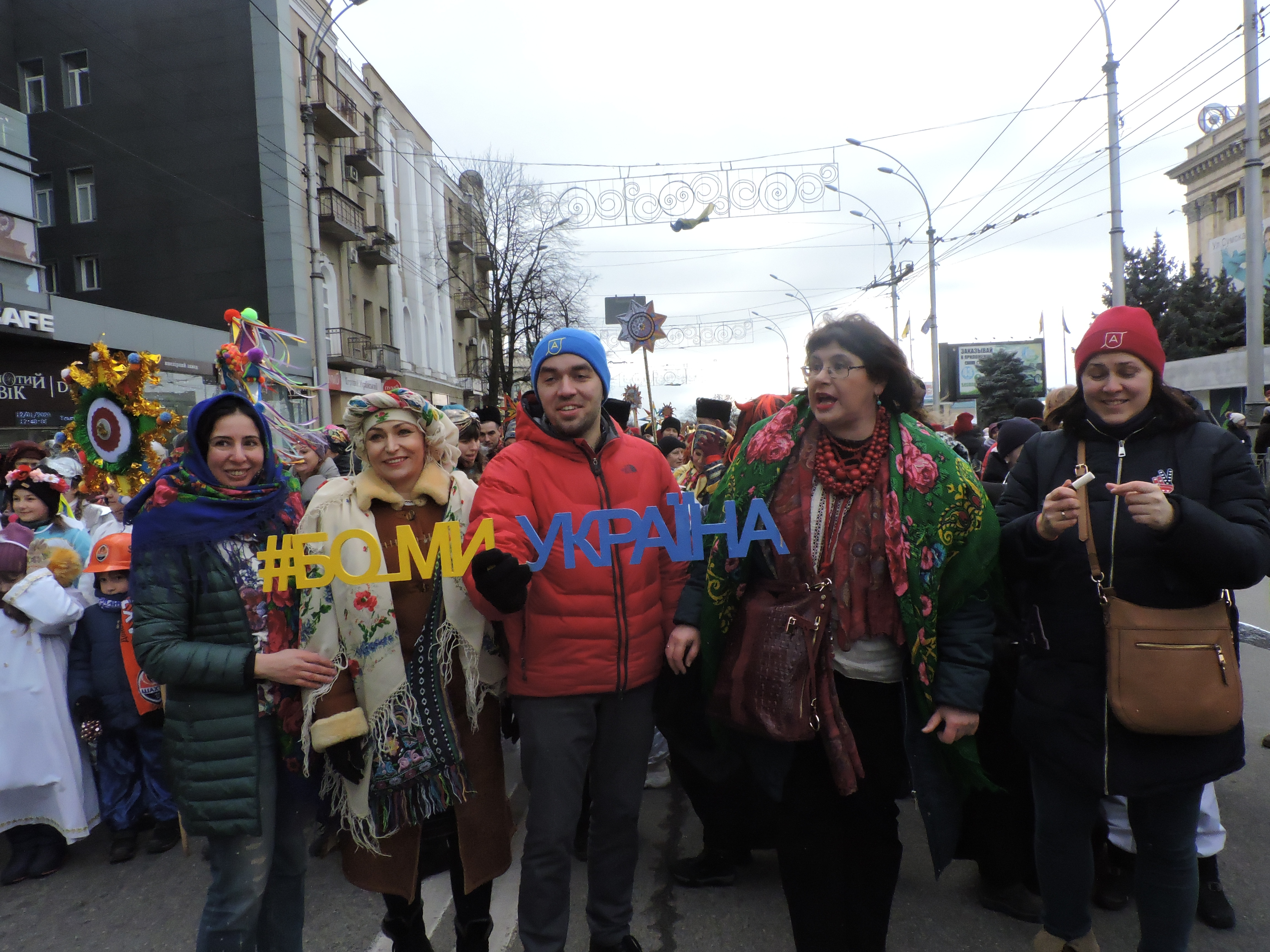 Вертепна хода вулицею Сумською від майдану Свободи до Головної сцени фестивалю в Центральному парку культури і відпочинку імені Максима Горького в рамках «Вертеп-фесту 2020».м. Харків, 12 січня 2020 року.На фото команда «Вертеп-фесту 2020»: Ірина Маркевич (координаторка студентських колективів, керівниця заходу «Слобожанські етновечорниці»), Ірина Голубєва (координаторка одночасного співу колядки «Нова радість стала»), Роман Тичківський (керівник Української академії лідерства), Олена Рофе-Бекетова (координаторка «Вертеп-фесту 2020»), Надія Савинська (керівниця Харківського осередку Української академії лідерства).